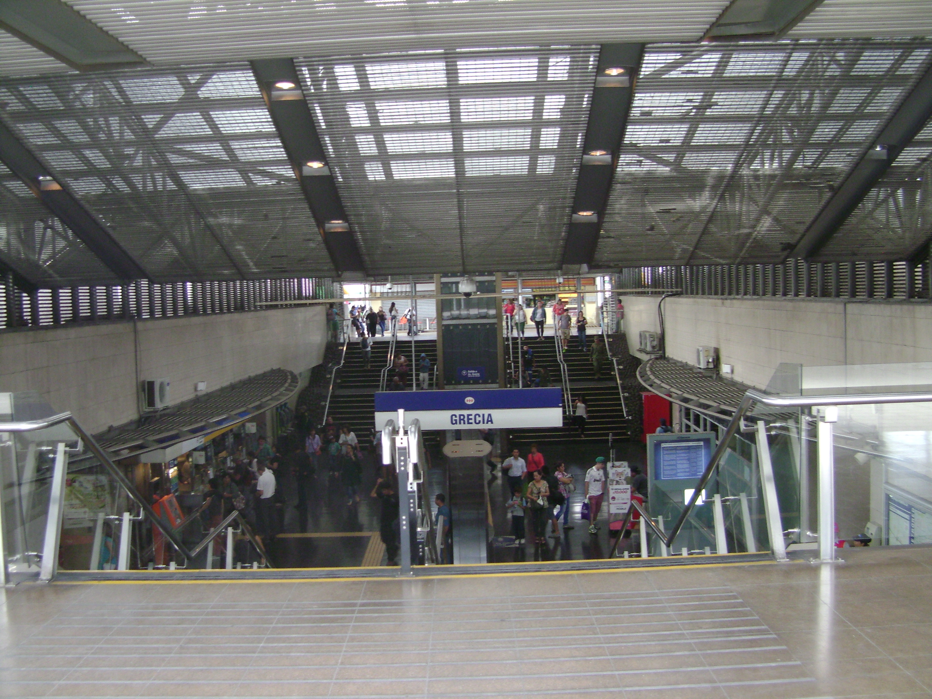 Metro de Santiago, Estación Grecia, acceso Sur